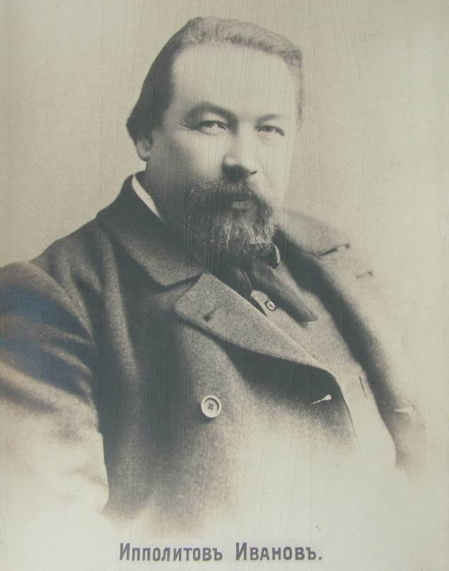 композитор Ипполитов-Иванов